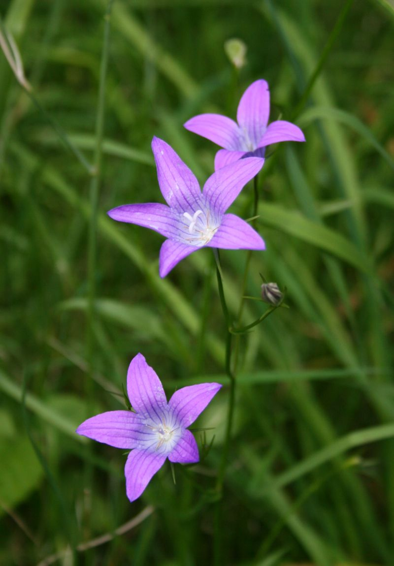 Wiesen-Glockenblume (Campanula patula), Glockenblumengewächse (Campanulaceae) - Österreich/Austria/Autriche: Oberösterreich, Hausruckviertel, ca. 2.2 km NE Forsthaus Redltal, ca. 700 m s.m.